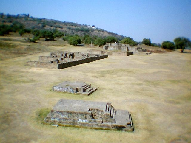 Imagen tomada en Acozac, Ixtapaluca, (Edo. de Mexico).